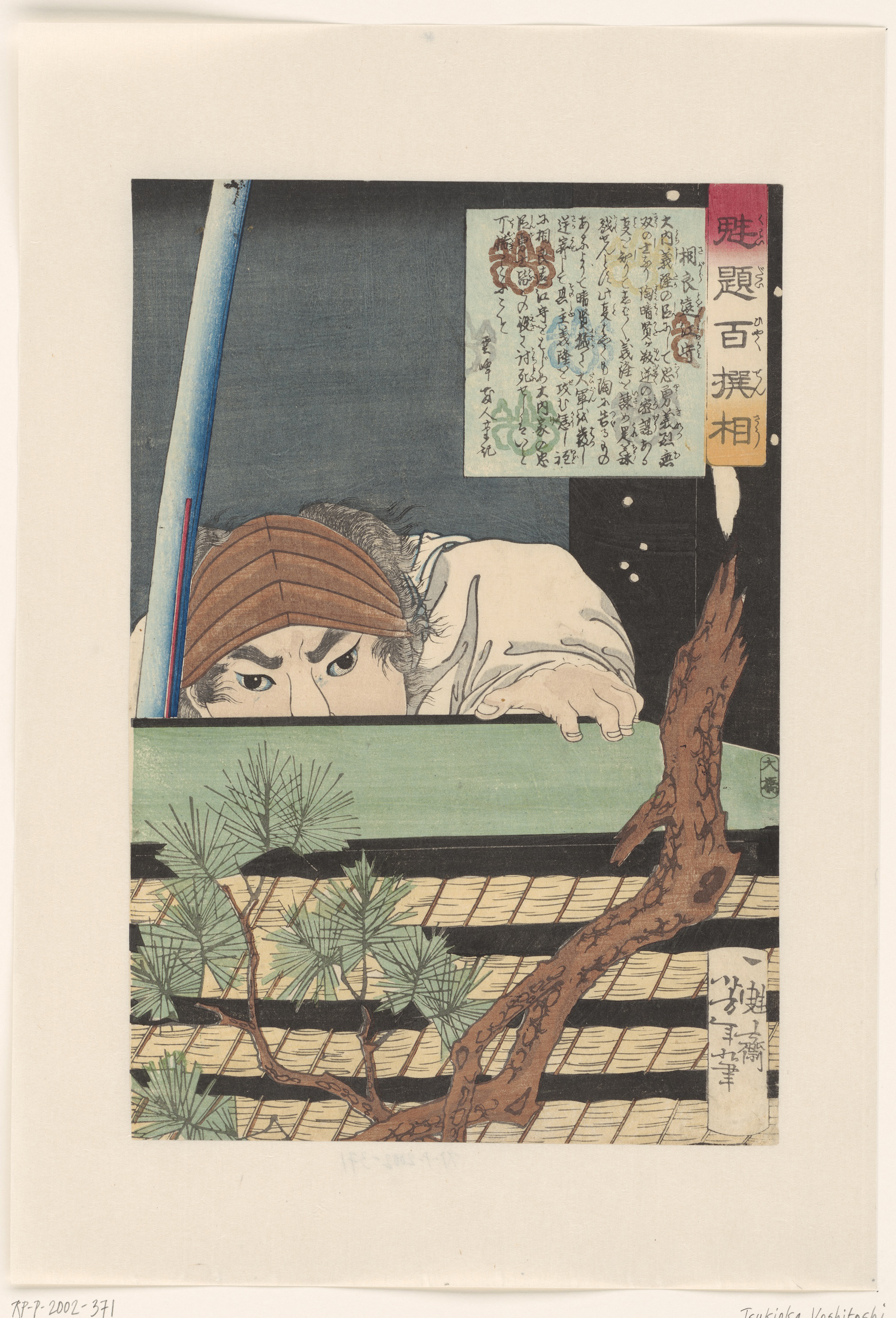 Sagara Totomi no Kami met geheven zwaard, zich veschuilend achter een stapel tatami matten. Een pijnboom op de voorgrond. Label Line: mentioned on object Tsukioka Yoshitoshi (1839 - 1892), 1868, kleurenhoutsnede; lijnblok met kleurblokken Collection: prenten; Japan (collectie)